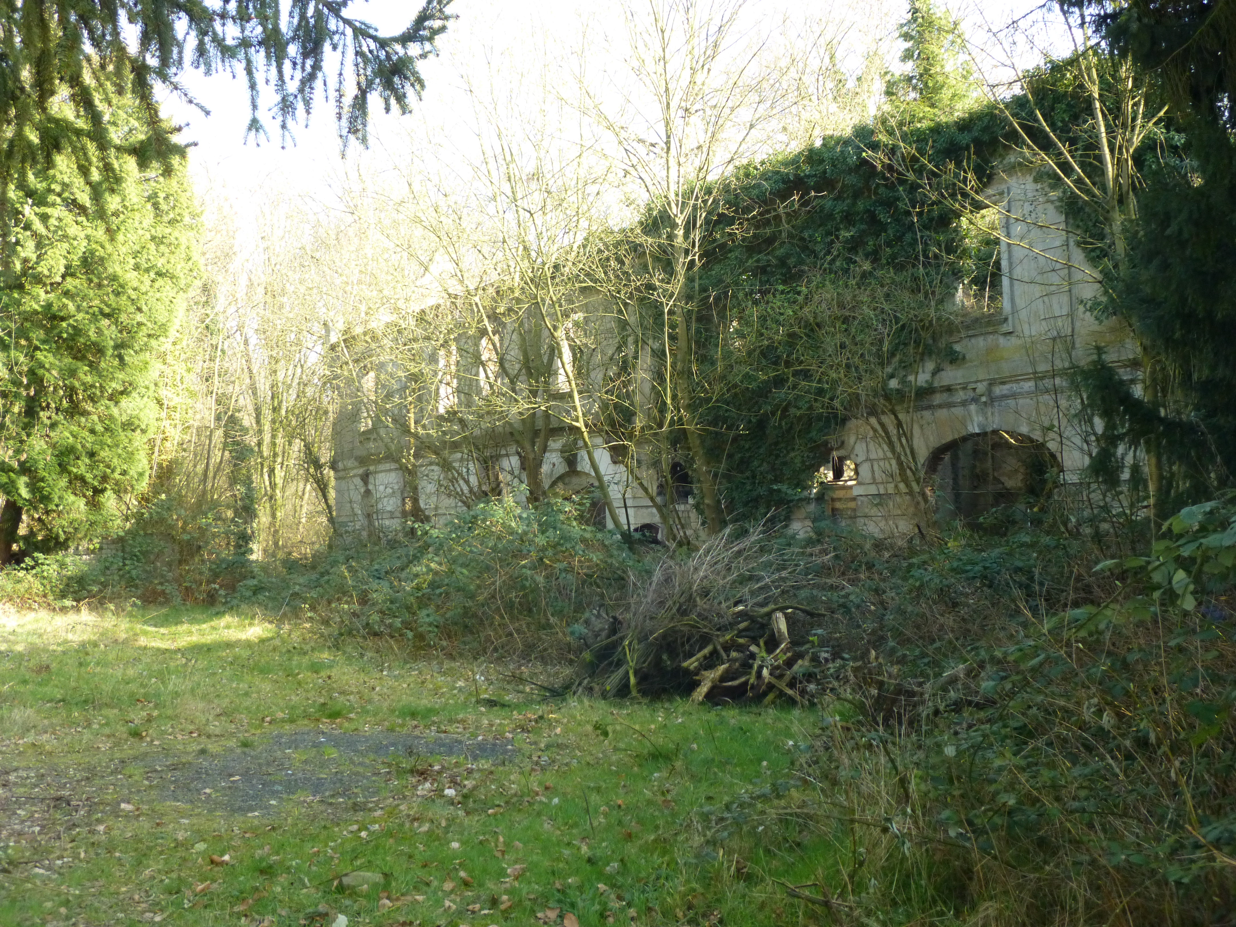 ehemaliges rechtes Wirtschaftsgebäude des Rittergutes